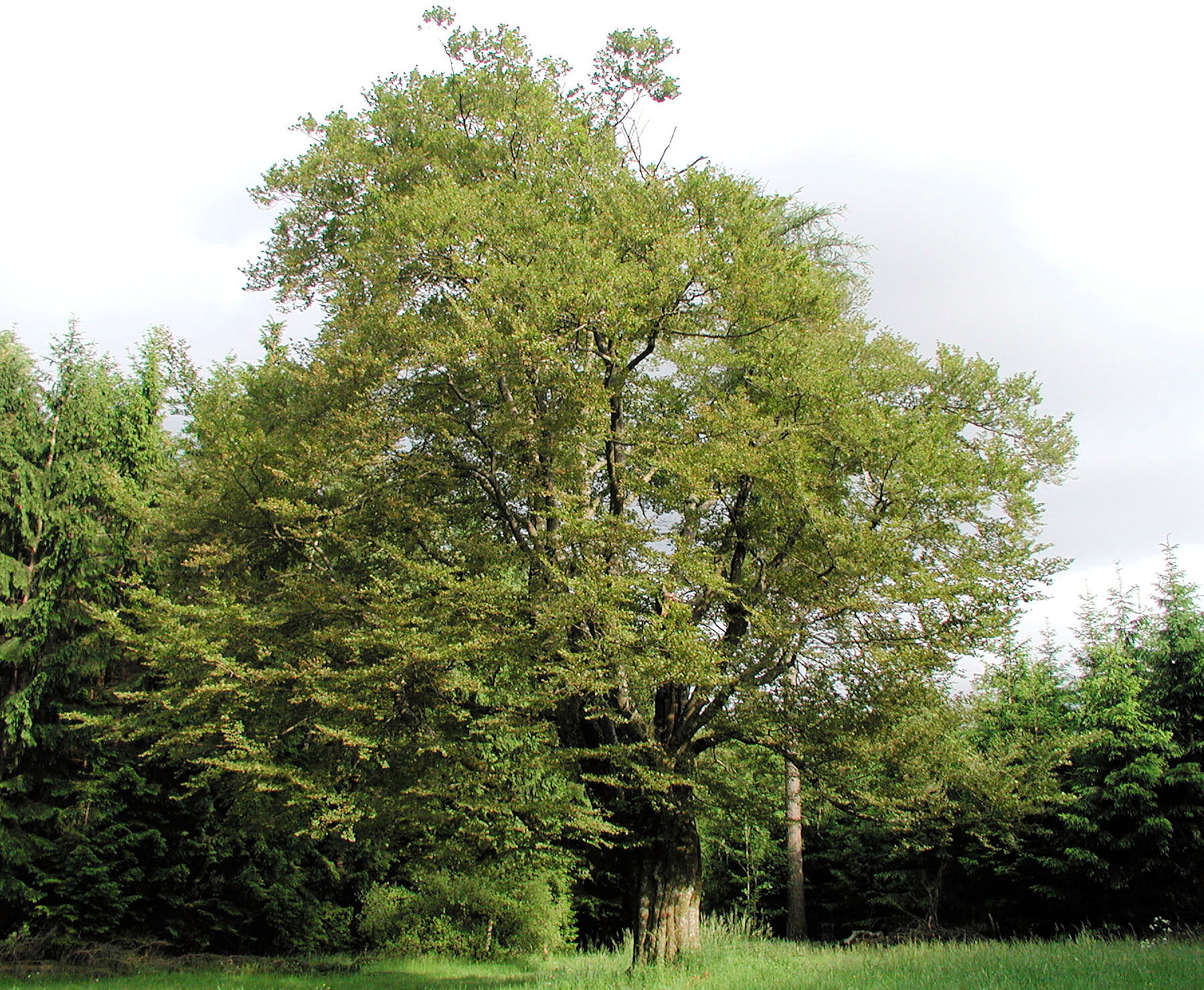 Die Hermann-Löns-Buche zwischen Schlierbach und Bottenhorn. Der Chronik des Gesangvereins Hartenrod zufolge wurde die Hermann-Löns-Buche am 2. August 1953 eingeweiht. Heute ist der Ort jedoch kaum mehr ausgeschildert, da der Aufenthalt unter dem Baum wegen herabfallender Äste verboten ist.